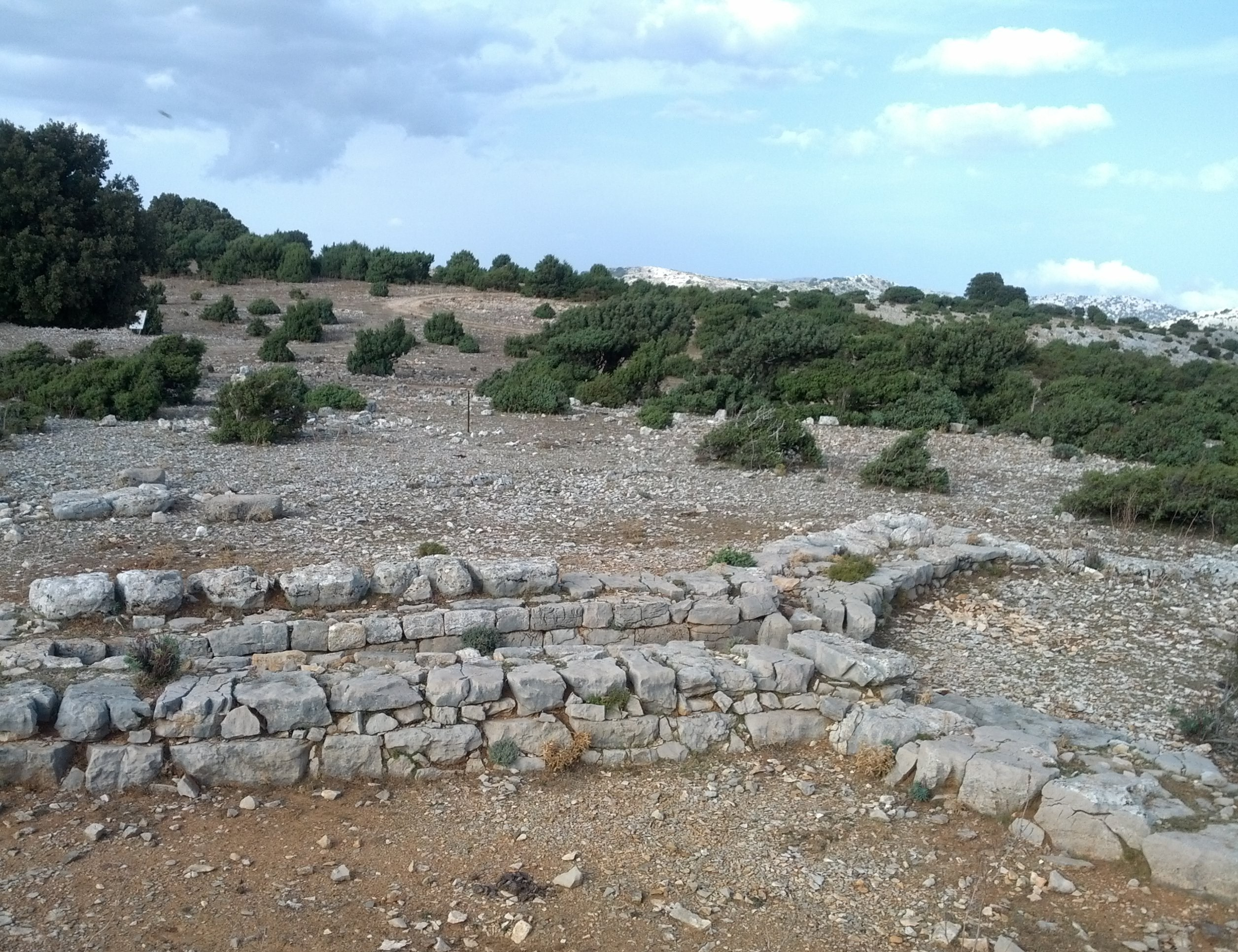 Tombe di giganti di Fennau This is a photo of a monument which is part of cultural heritage of Italy.